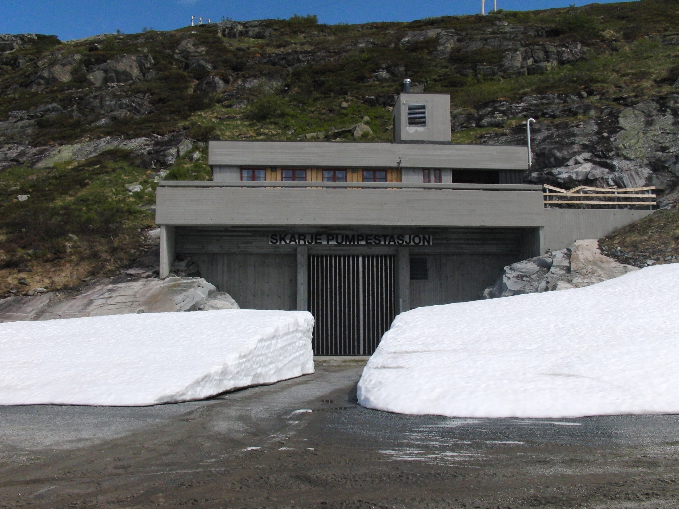 Skarje pumpestasjon (Holen kraftverk)